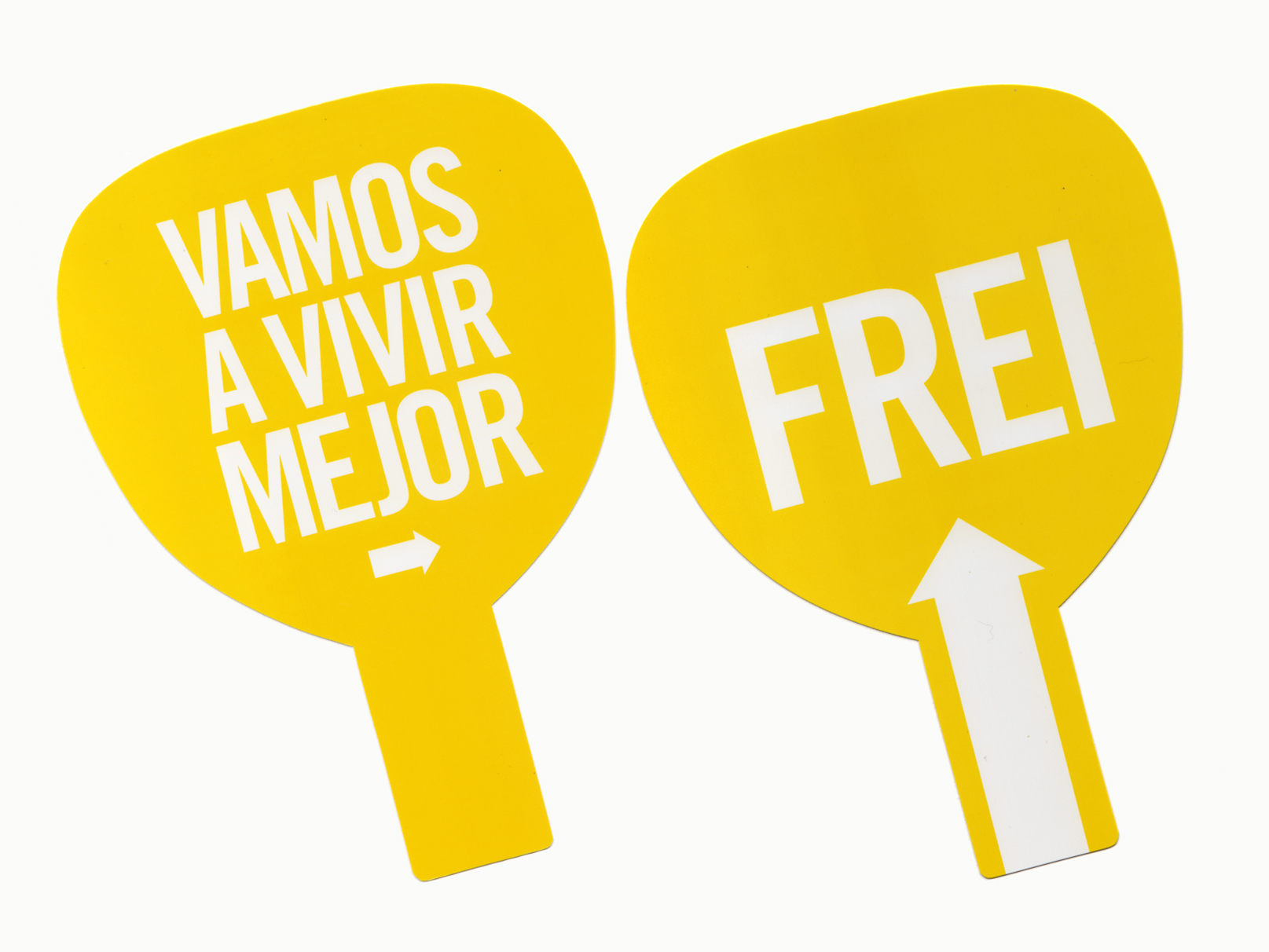 Abanicos promocionales repartidos durante la campaña de Eduardo Frei, candidato a la presidencia de Chile en las elecciones de diciembre de 2009.